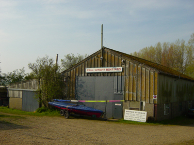 Werk plaats Paul Wrights